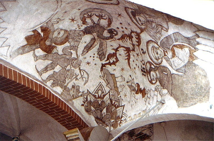 Birket Kirke i Danmark. Kor østhvælv, Gethsemane